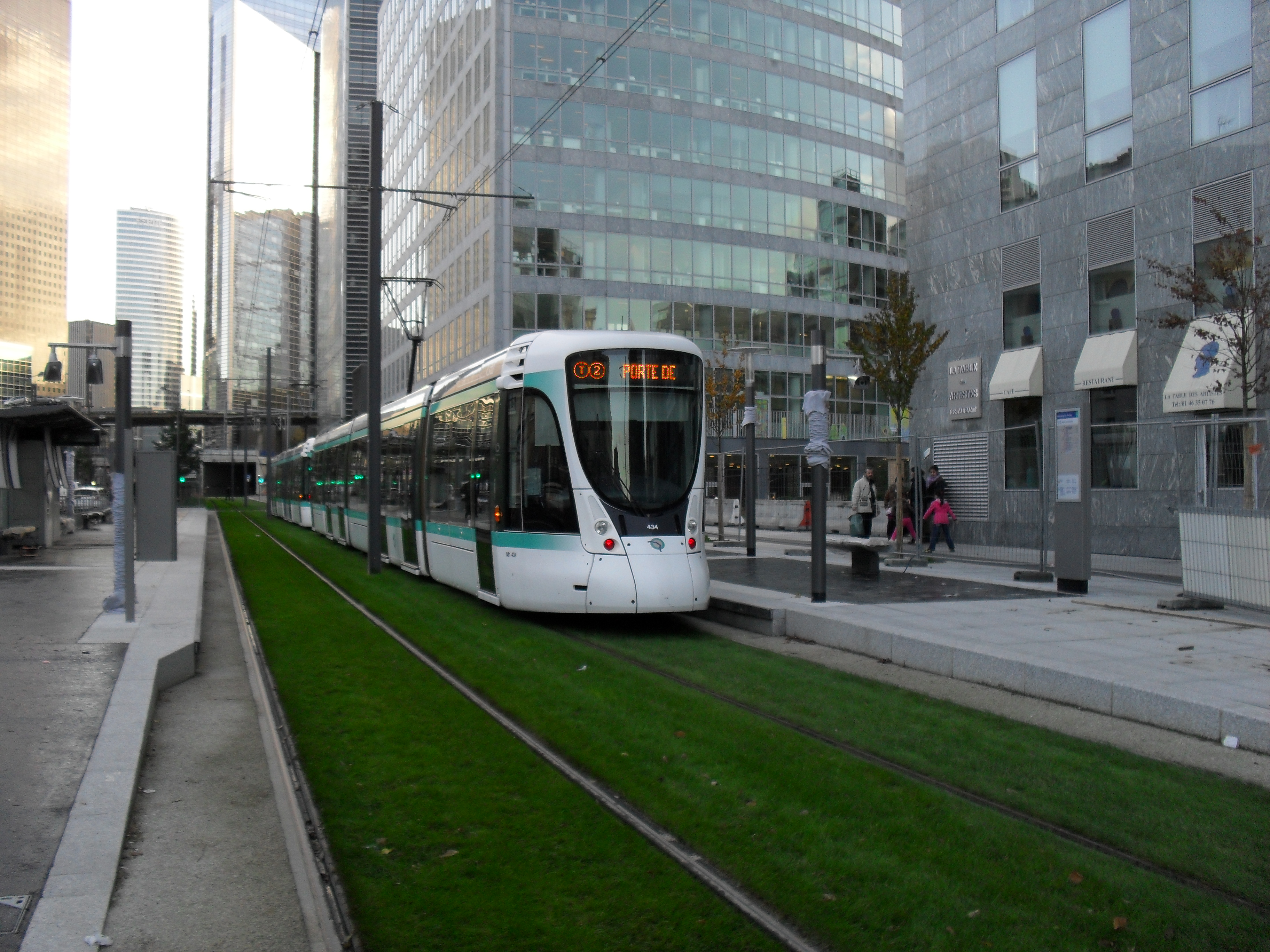 Paris Tramway ligne 2